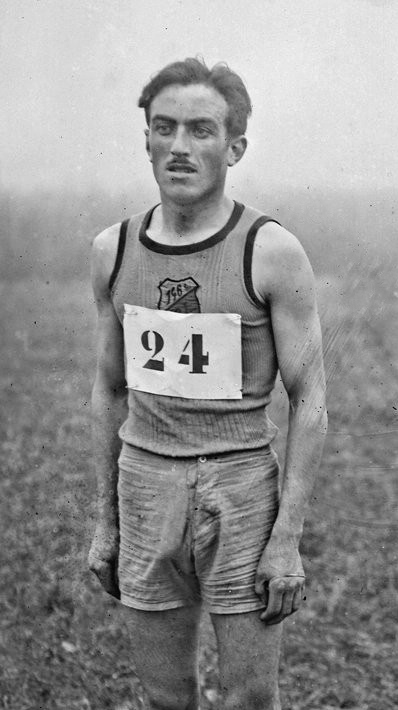 [Maurice] Morland [i.e. Norland], gagnant [du] cross [de l']Olympique, 1e et 2e catégories : [photographie de presse] / [Agence Rol]